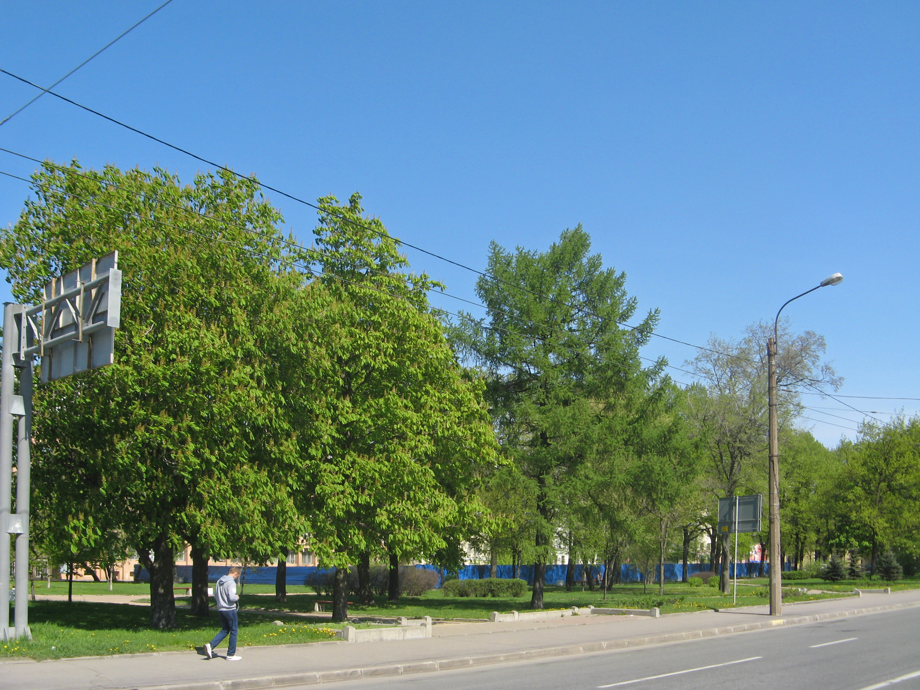 Гренадерский сад, Санкт-Петербург